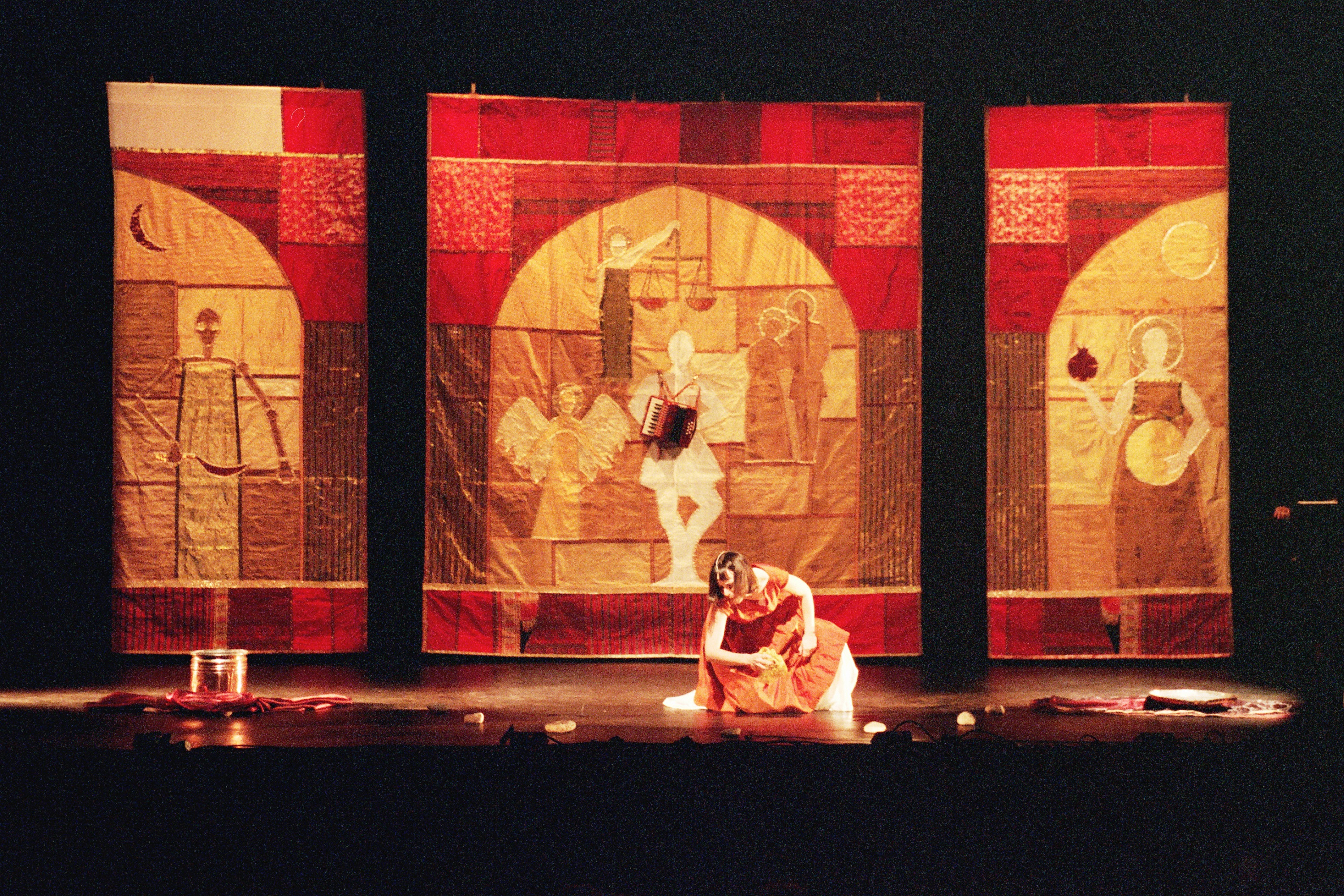 אתי בן-זקן במופע "סטאבט מאטר - תפילה אנושית" על רקע קולאז' הבדים שיצרה למופע. צילום: יעל חביליו